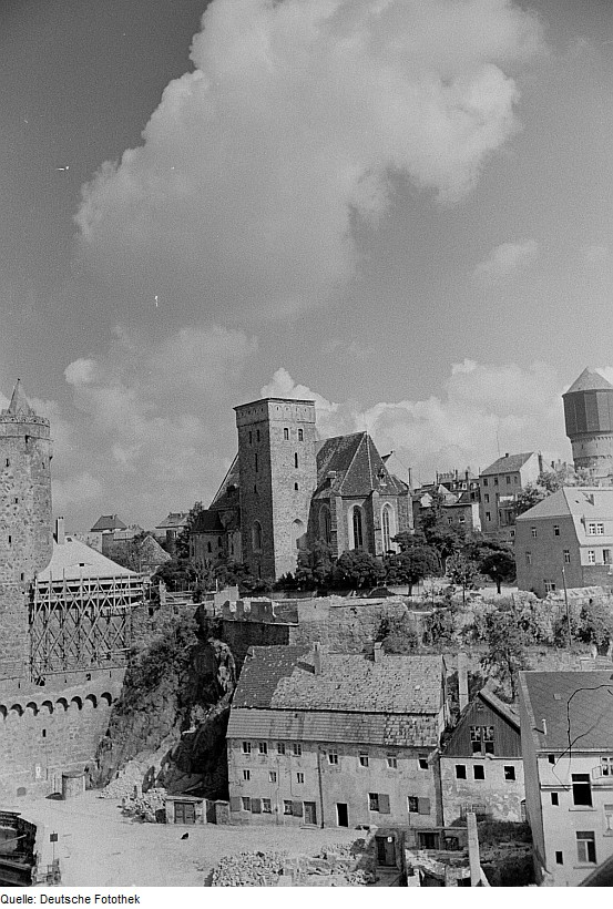 Original image description from the Deutsche Fotothek Altstadtansicht